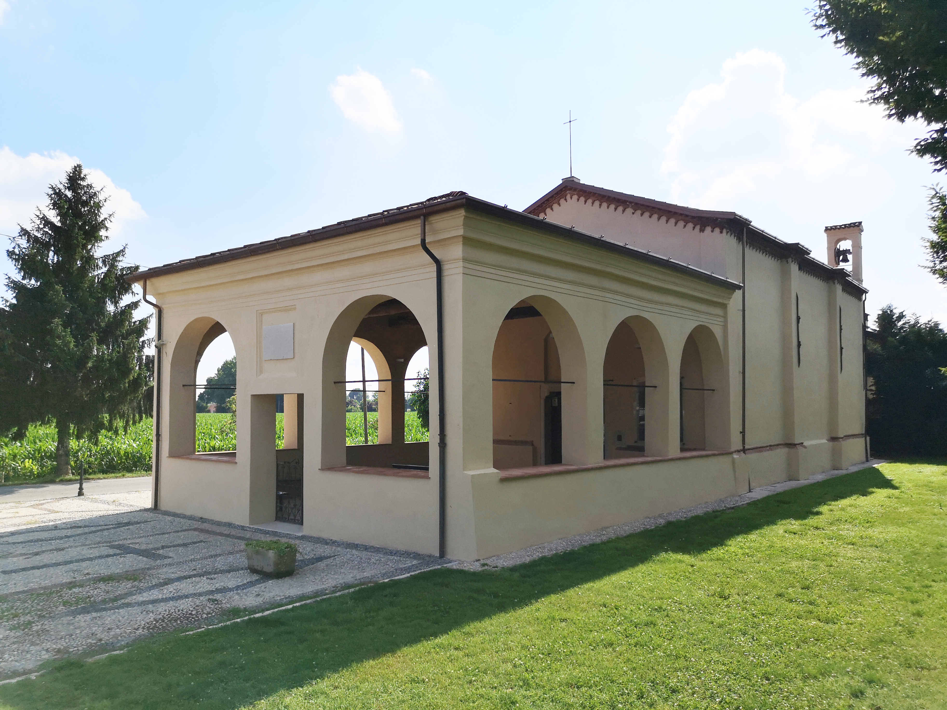 La Chiesa di Santa Maria dei Campi vista dal piazzale frontale